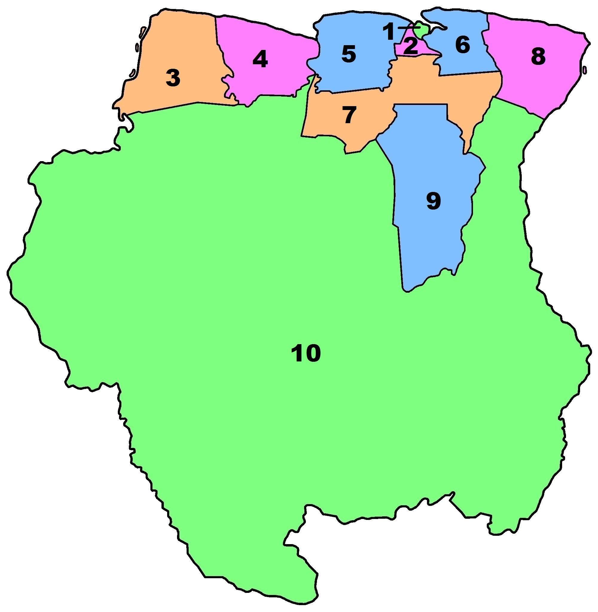 Carte numérotée des districts du Suriname.